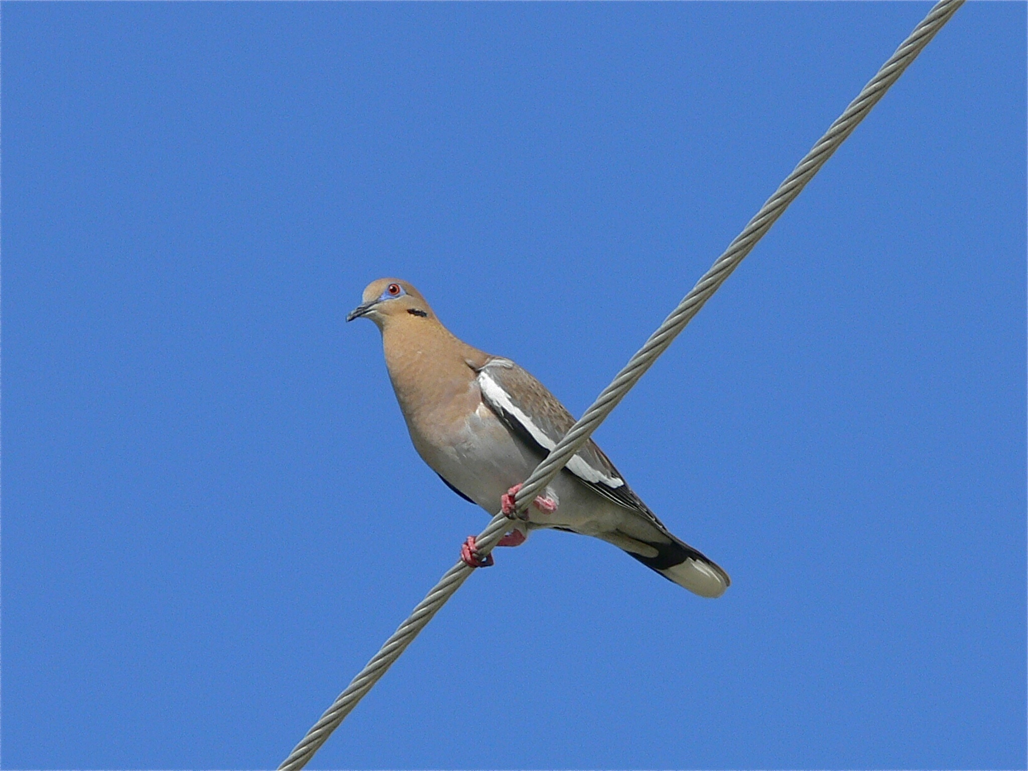 Caye Caulker, BELIZE